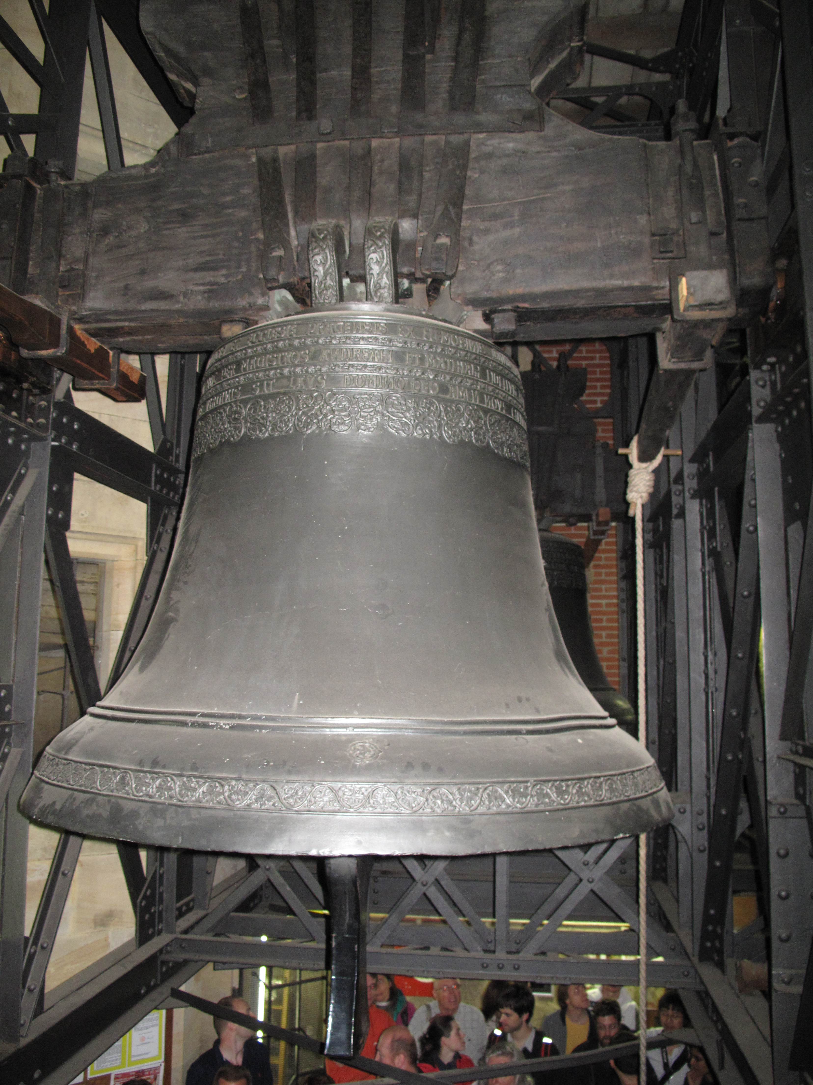 Chrám svatého Víta Zvon Václav